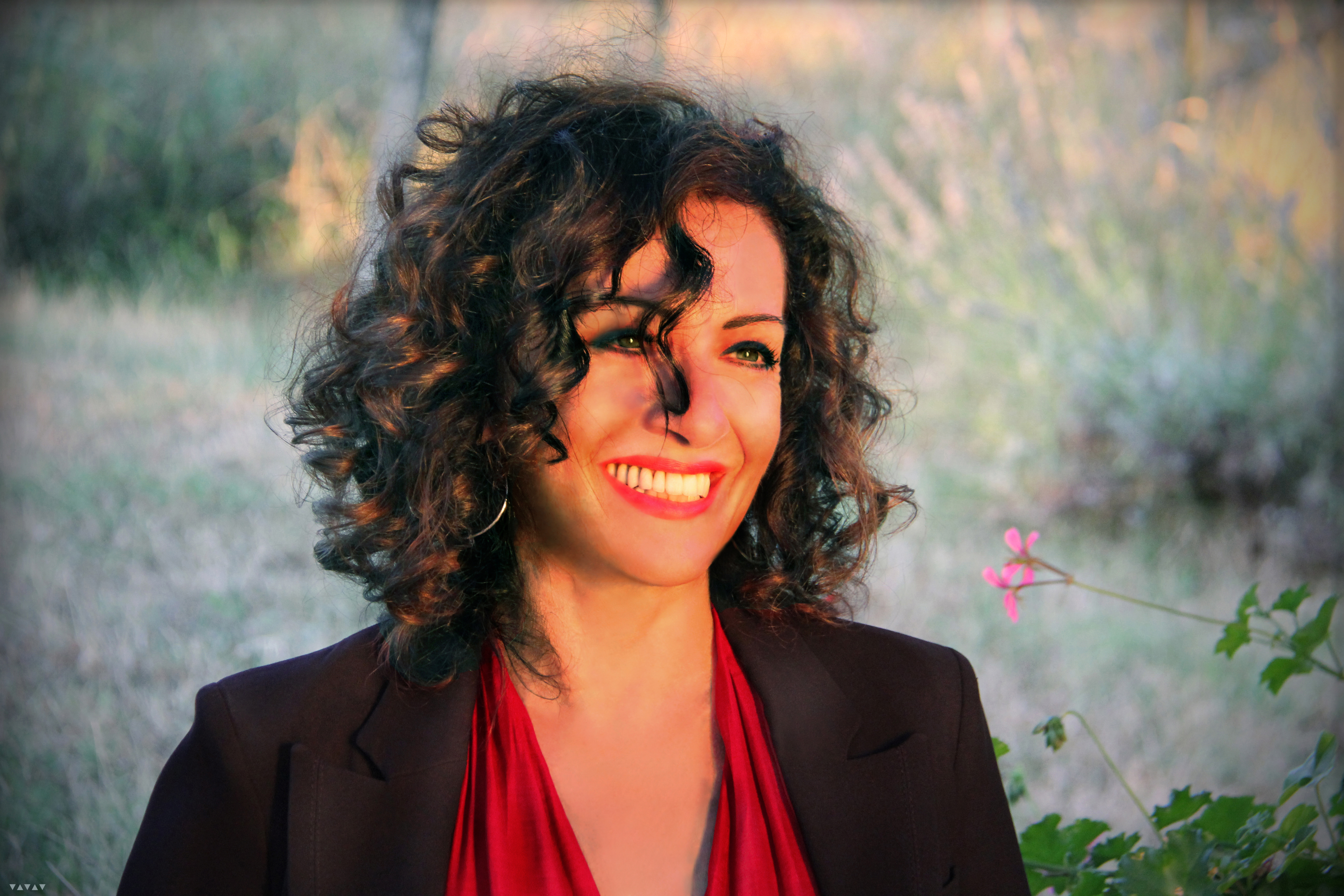 Ritratto di Antonella Zucchini